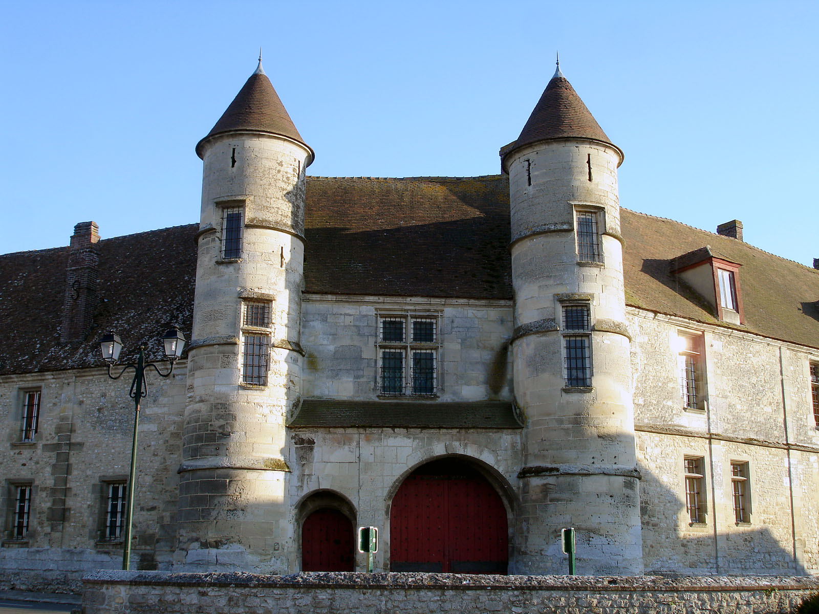 Le manoir seigneurial à Moussy, Val-d'Oise, France.